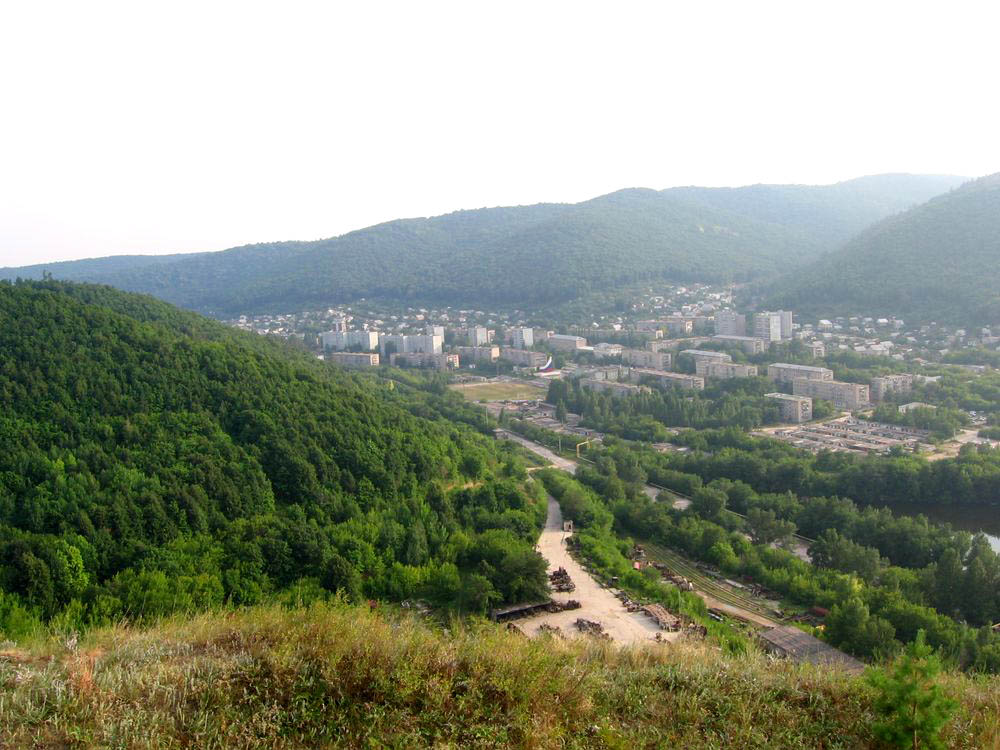 Вид на посёлок Яблоневый Овраг в Самарской области России.